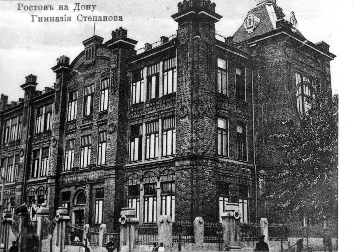 Гимназия Степанова в Ростове-на-Дону на дореволюционной открытке.